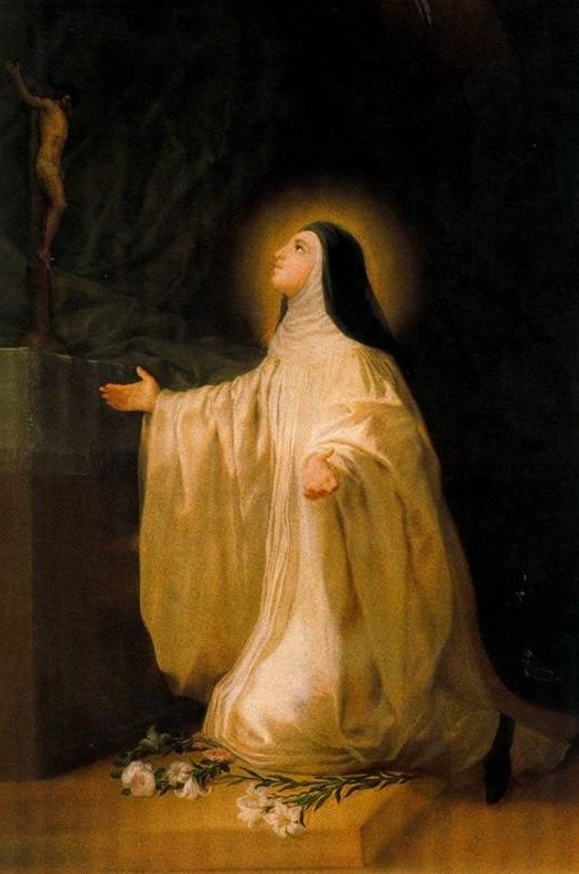 Santa Lutgarda (Saint Lutgart, Lutgart, San Joaquín and Santa Ana Monastery, Valladolid, Spain)